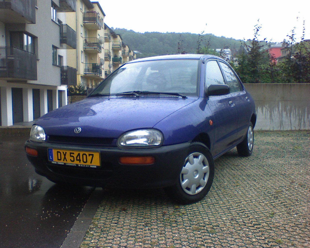 Mai Mazda 121 (1996) vun vir op engem private Parking zu Schëffleng.